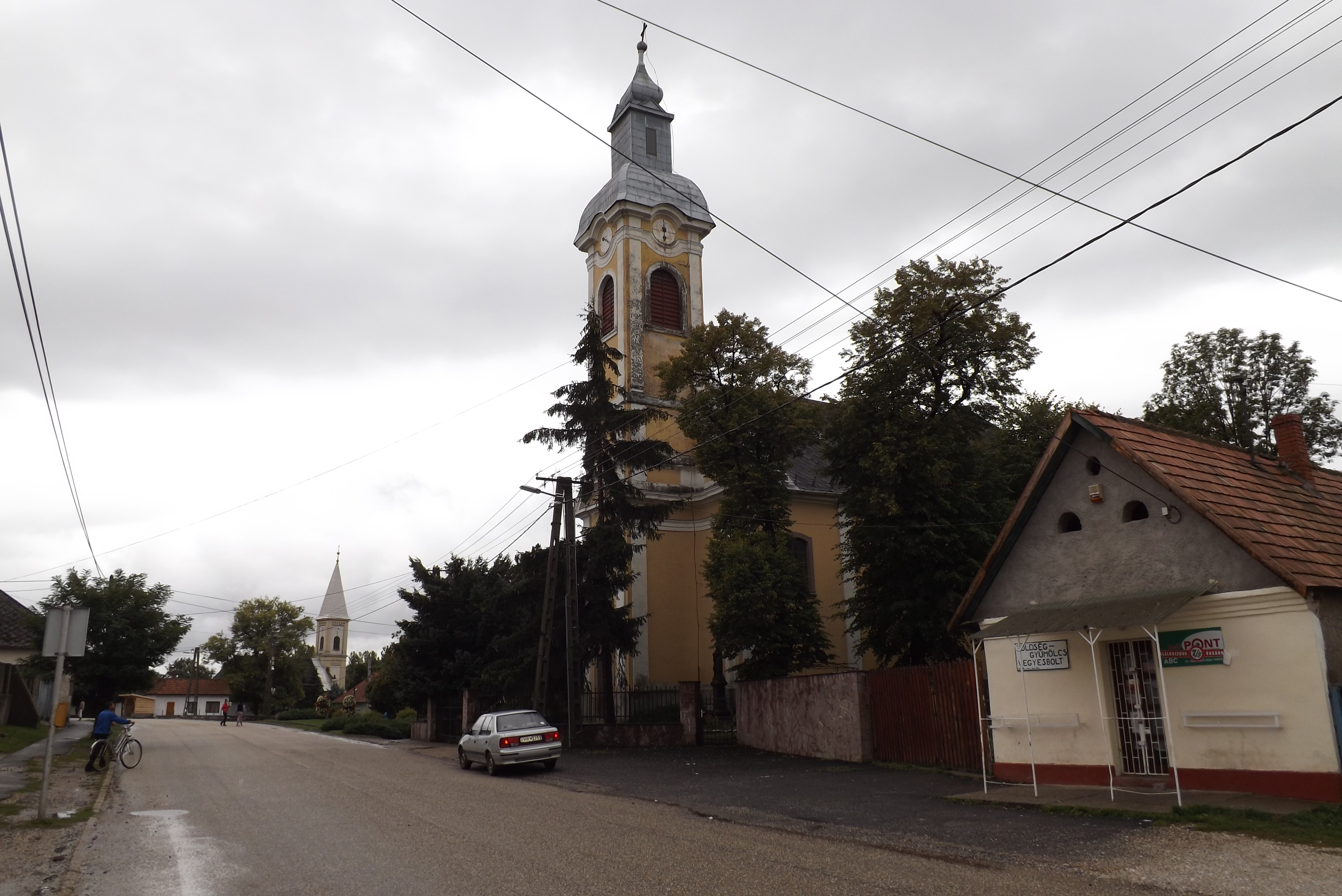 Borsod-Abaúj-Zemplén megye, Sály főutcája. A Római katolikus templom, késő barokk, 1790 körül. Azonosító 3084 (törzsszám 1174)